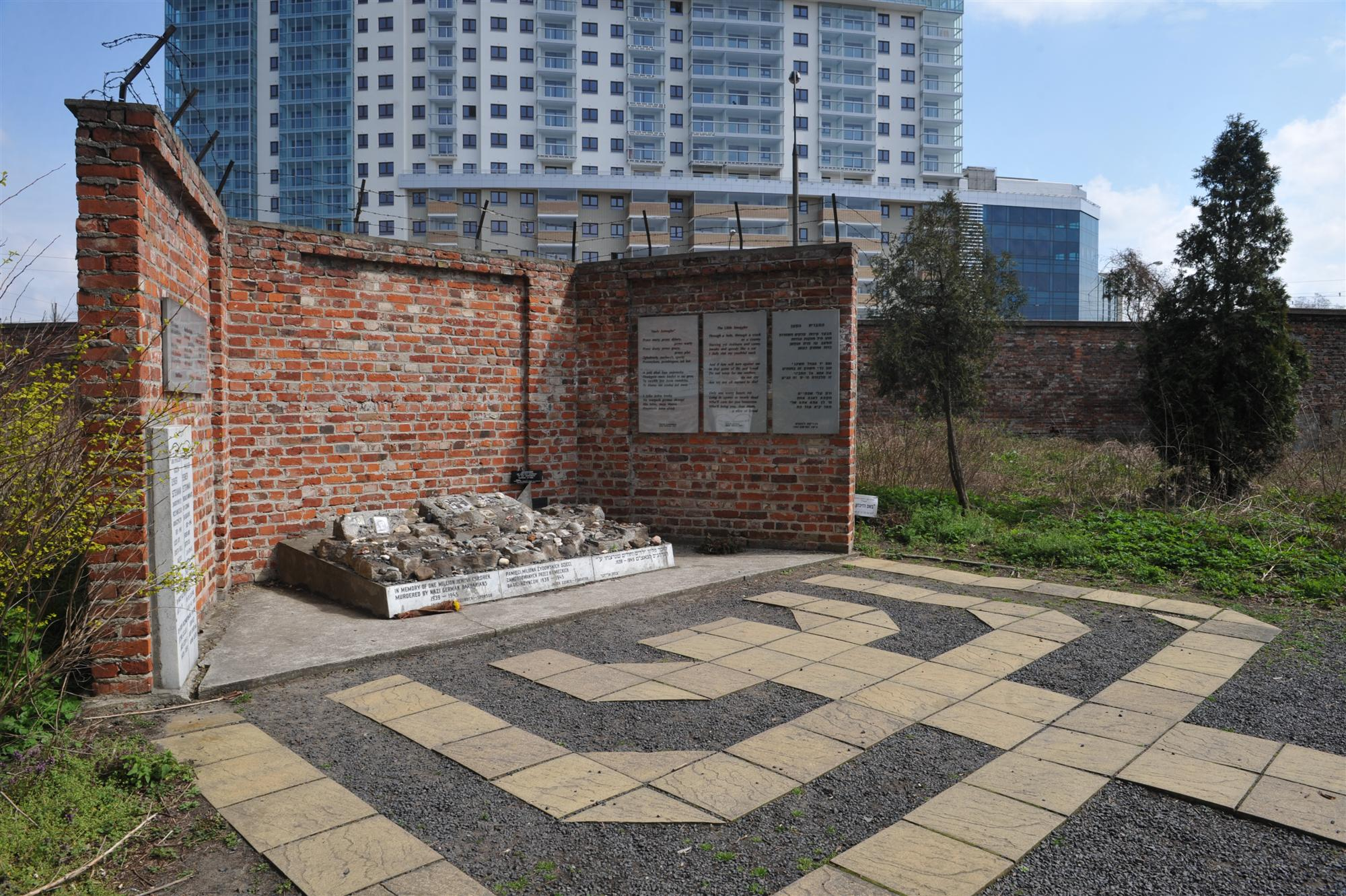 Pomnik Pamięci Dzieci – Ofiar Holokaustu